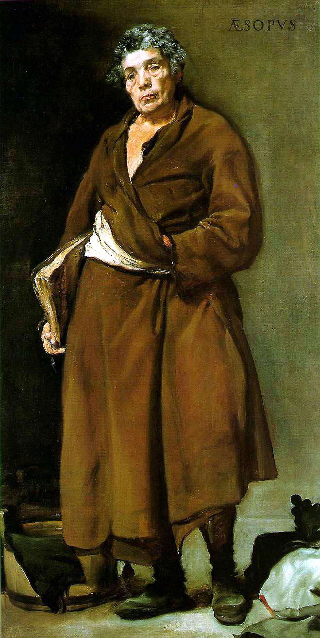 La obra representa al fabulista griego Esopo, y fue realizada por el pintor sevillano Diego Velázquez hacia el año 1638.